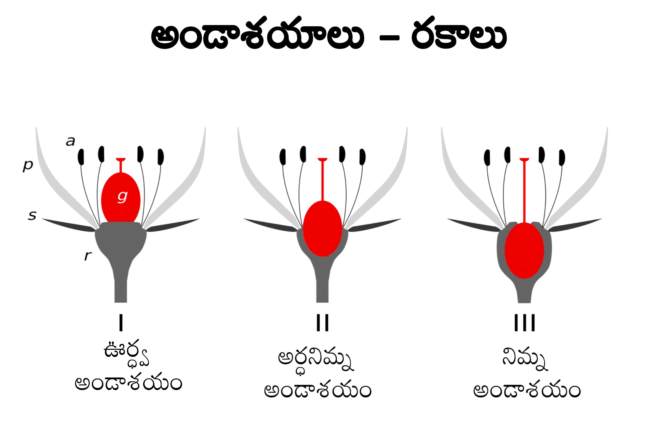 పుష్పభాగాలు